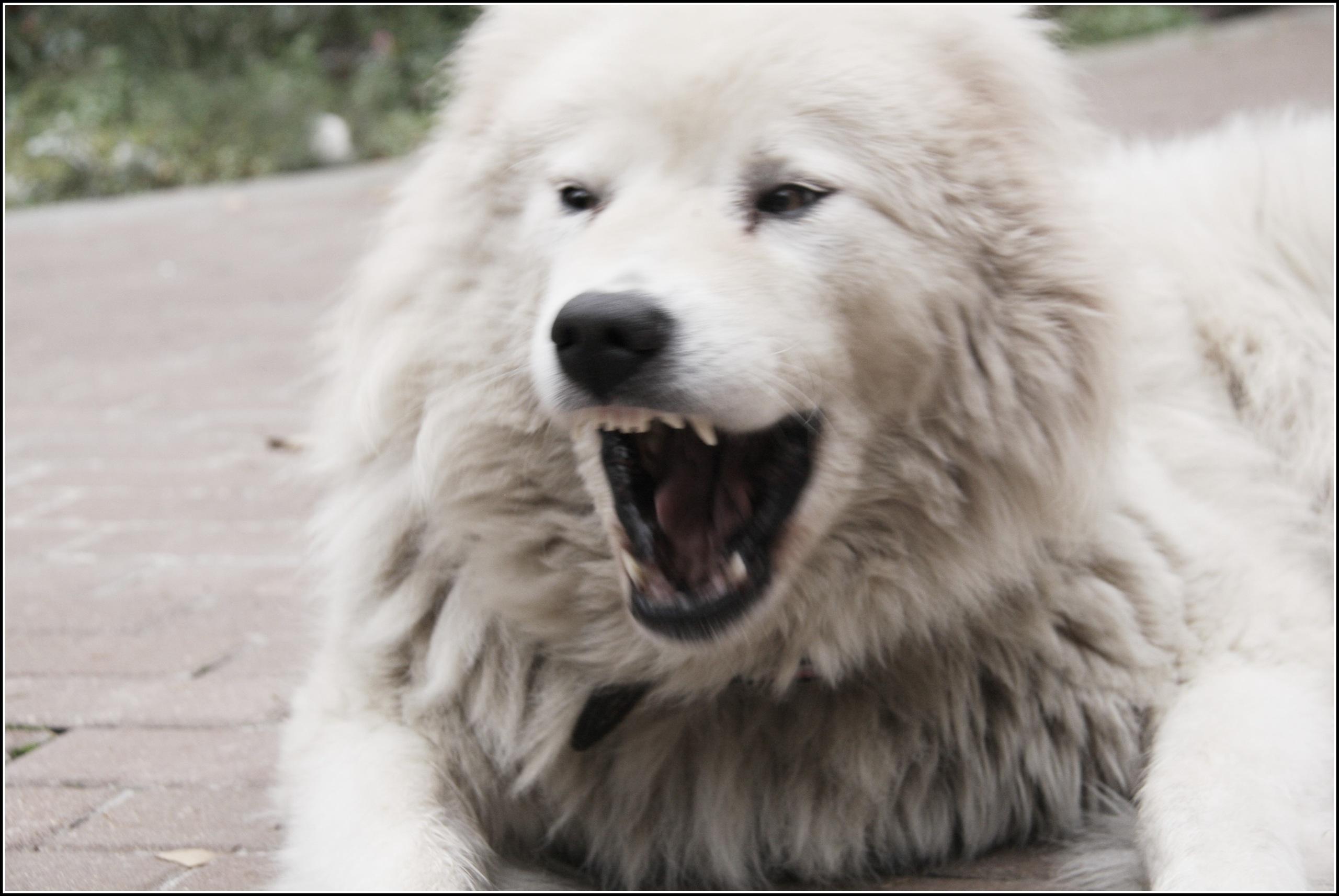 Мареммо-абруццкая овчарка